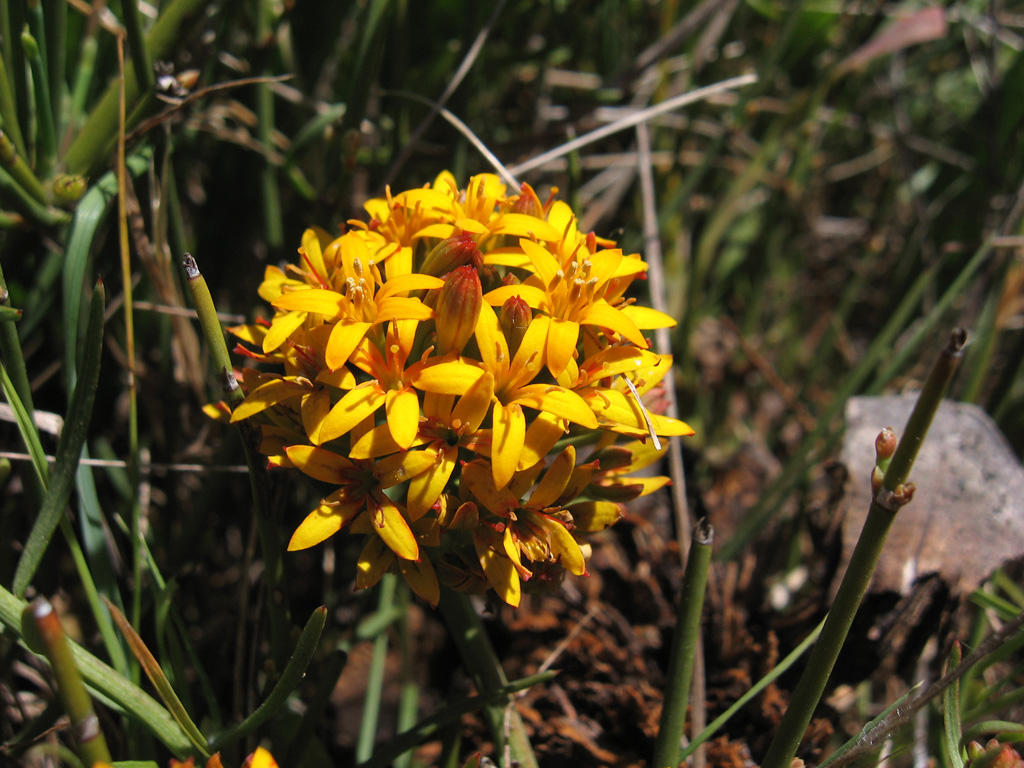 nombre común: Quinchamalí (Quinchamalium chilense)